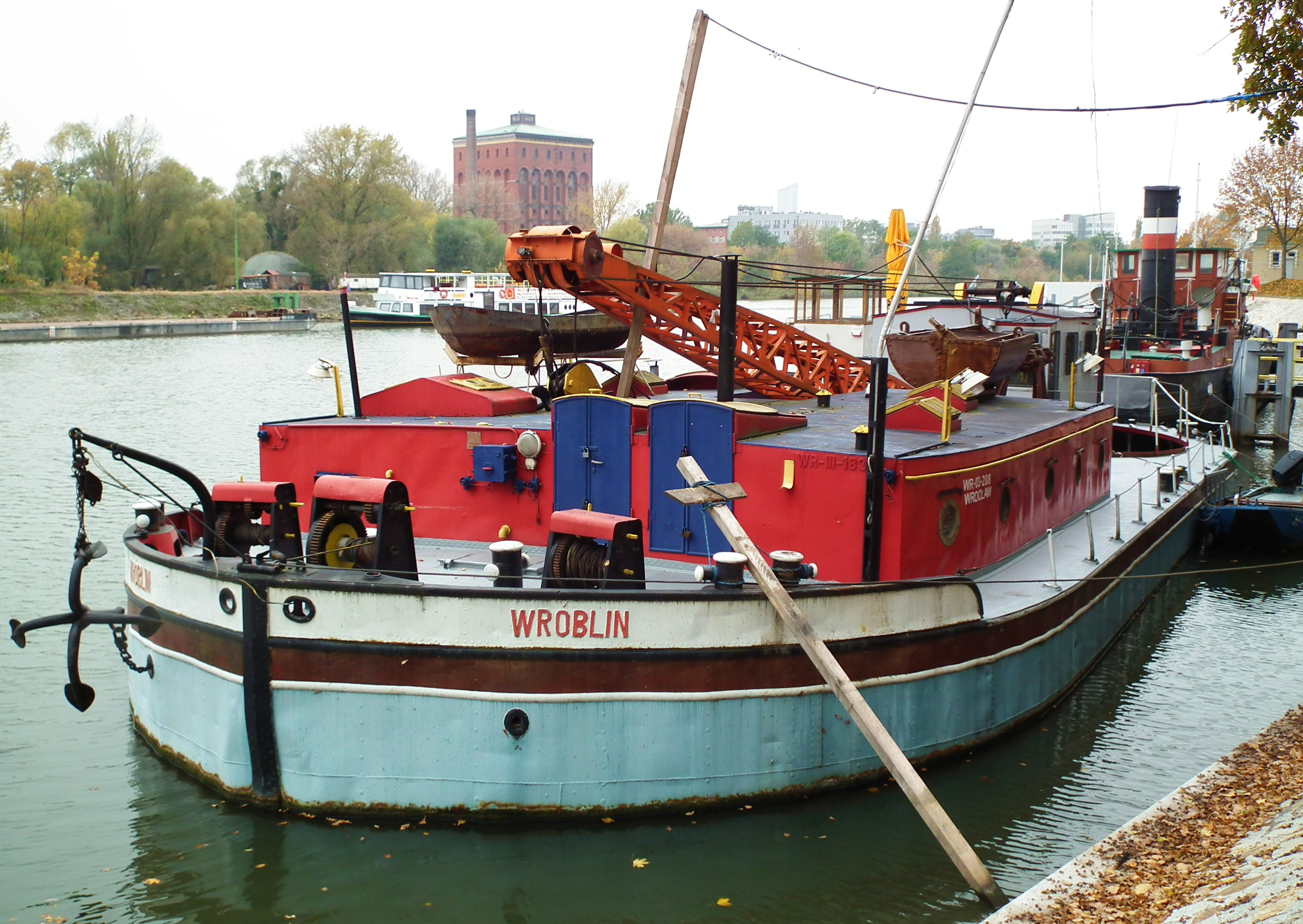 Barka Wróblin na Starej Odrze we Wrocławiu.